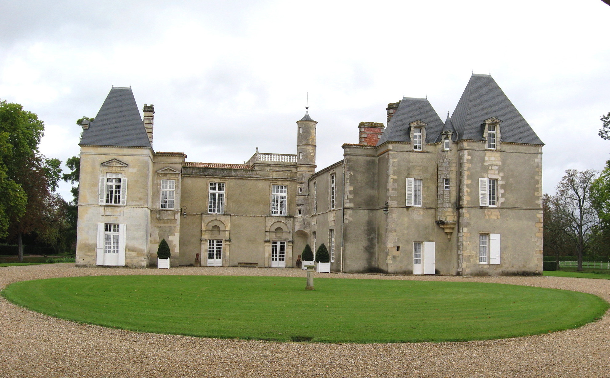 A l'intérieur de l'enceinte, le château. ISMH 1970 .